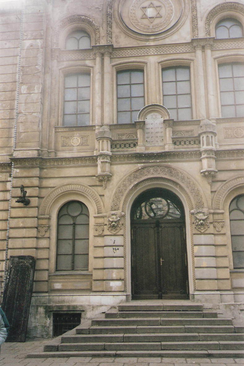 בית הכנסת "נוז'יק" בורשה